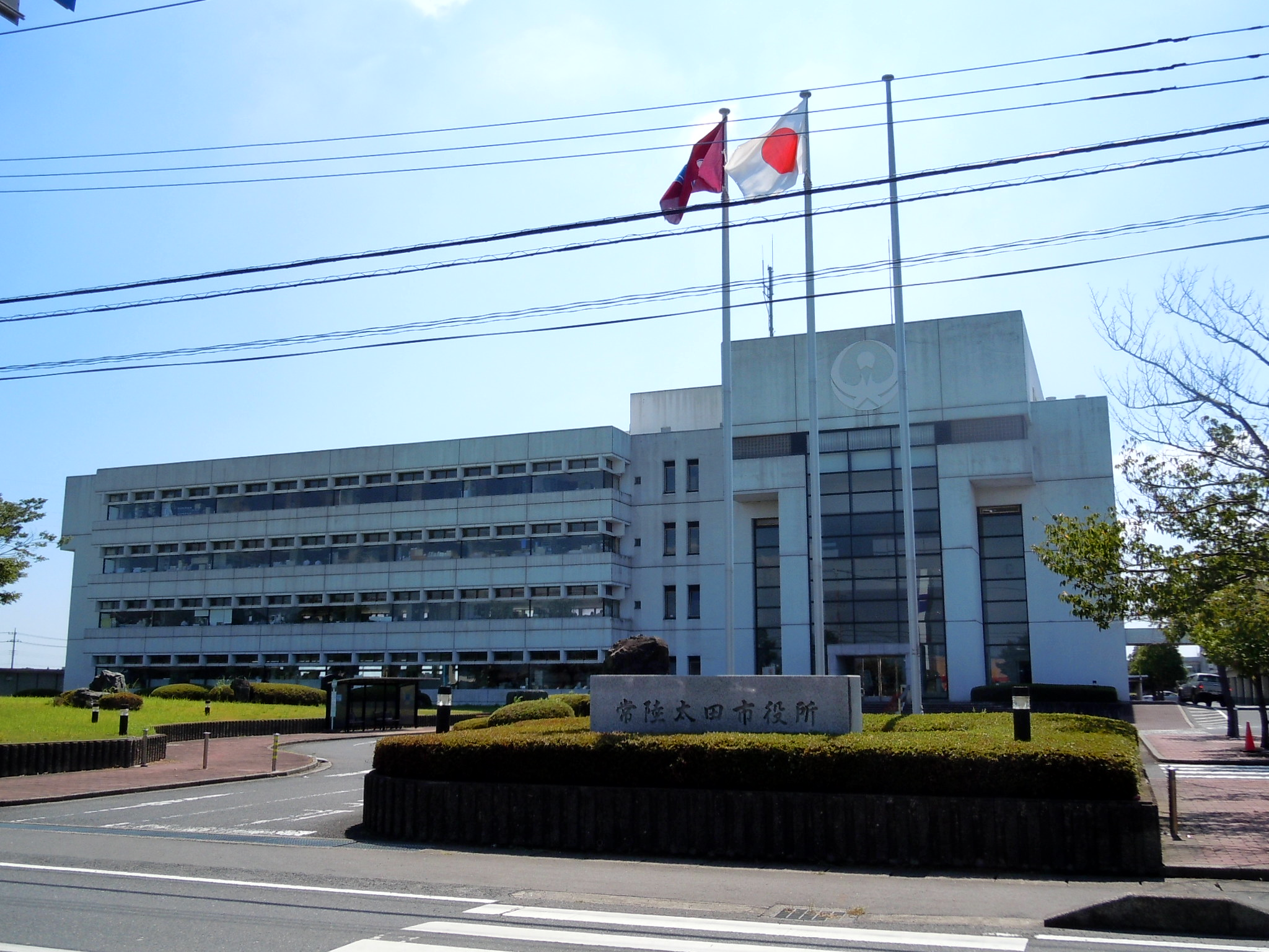 常陸太田市役所